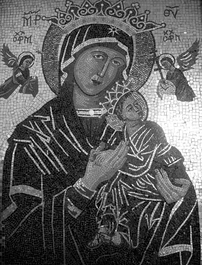 Original icon of Our Lady of Perpertual Help (Succour) in Sant'Alfonso di Liguori (Rome)